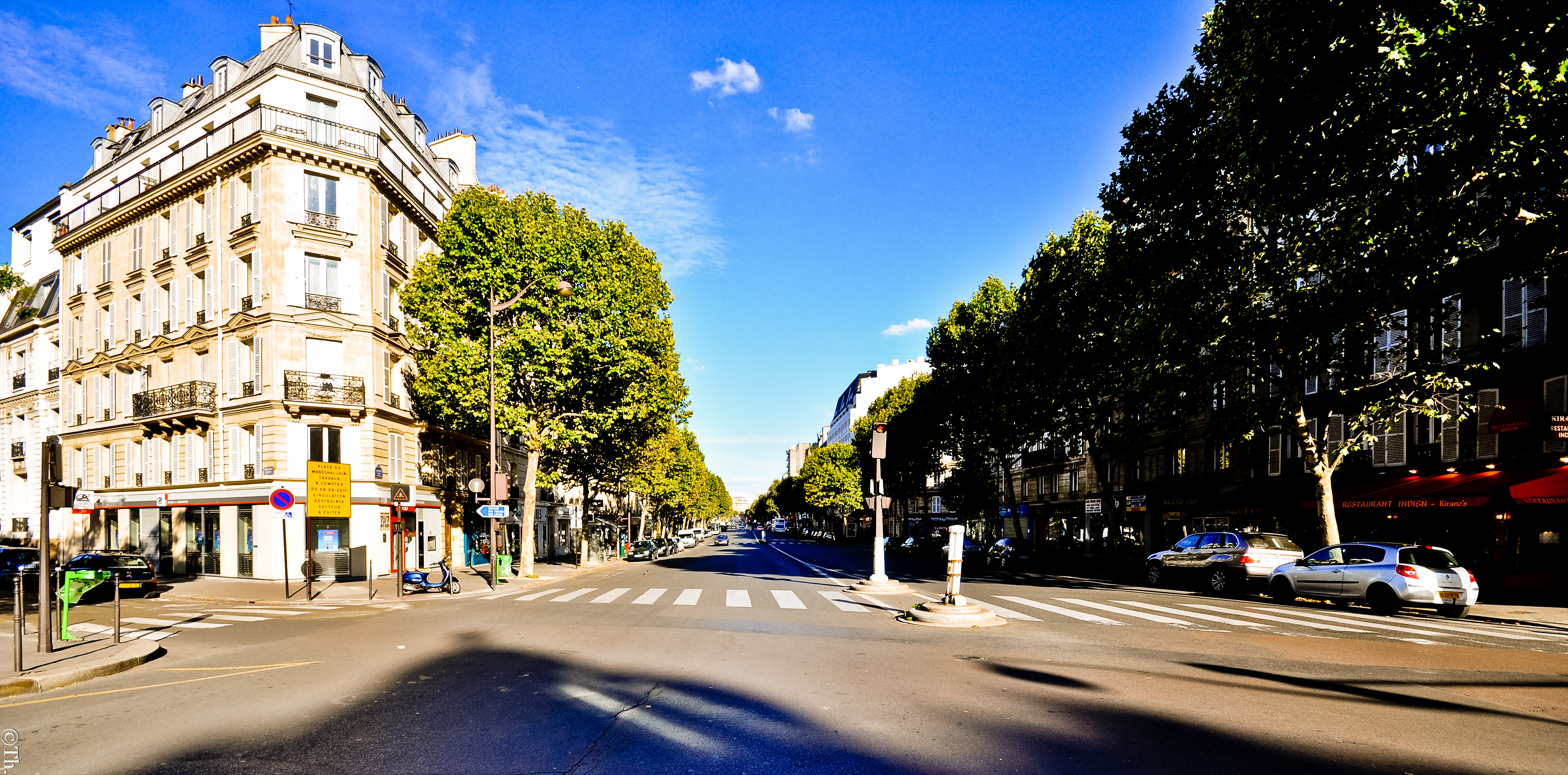 Avenue des Ternes, Paris.